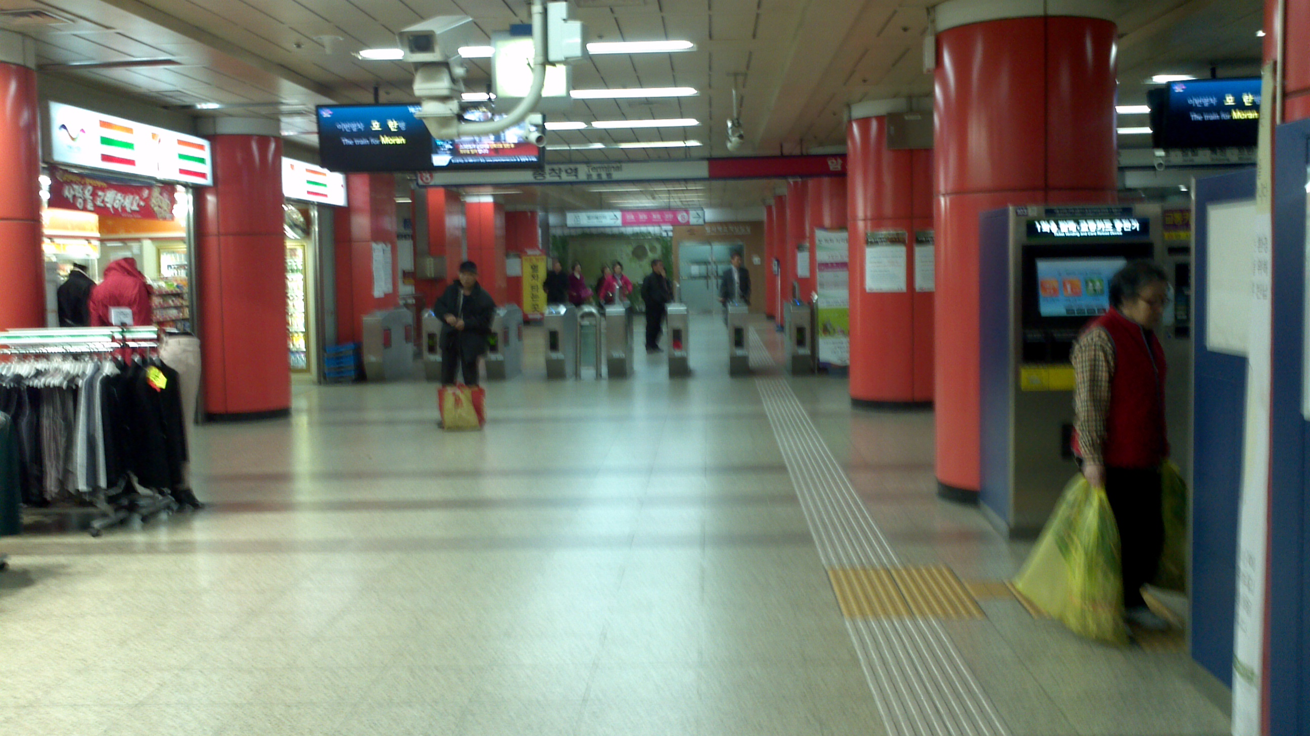 암사역 대합실